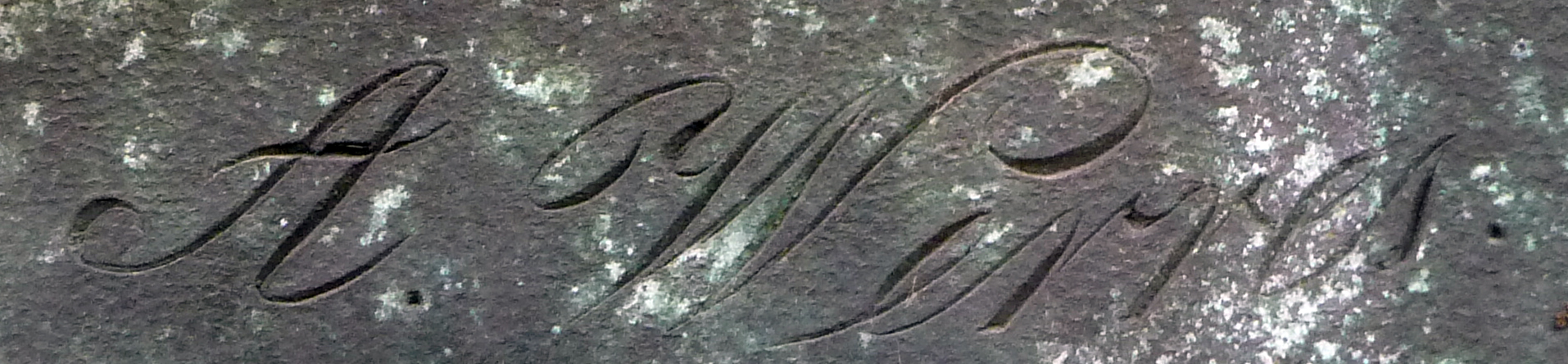 Bronzerelief mit Signatur vom Künstler Anton Werres auf dem Grabmal von Hermann Heinrich Becker auf dem Kölner Melaten-Friedhof. Künstler: Anton Werres (1830–1900) DescriptionGerman artistdeutscher BildhauerDate of birth/death 1 January 1830 27 April 1900Location of birth/death Cologne CologneWork location Cologne, RomAuthority control : Q15729050 VIAF: 81616740 ISNI: 0000 0000 6689 7990 ULAN: 500088900 GND: 137423101 creator QS:P170,Q15729050